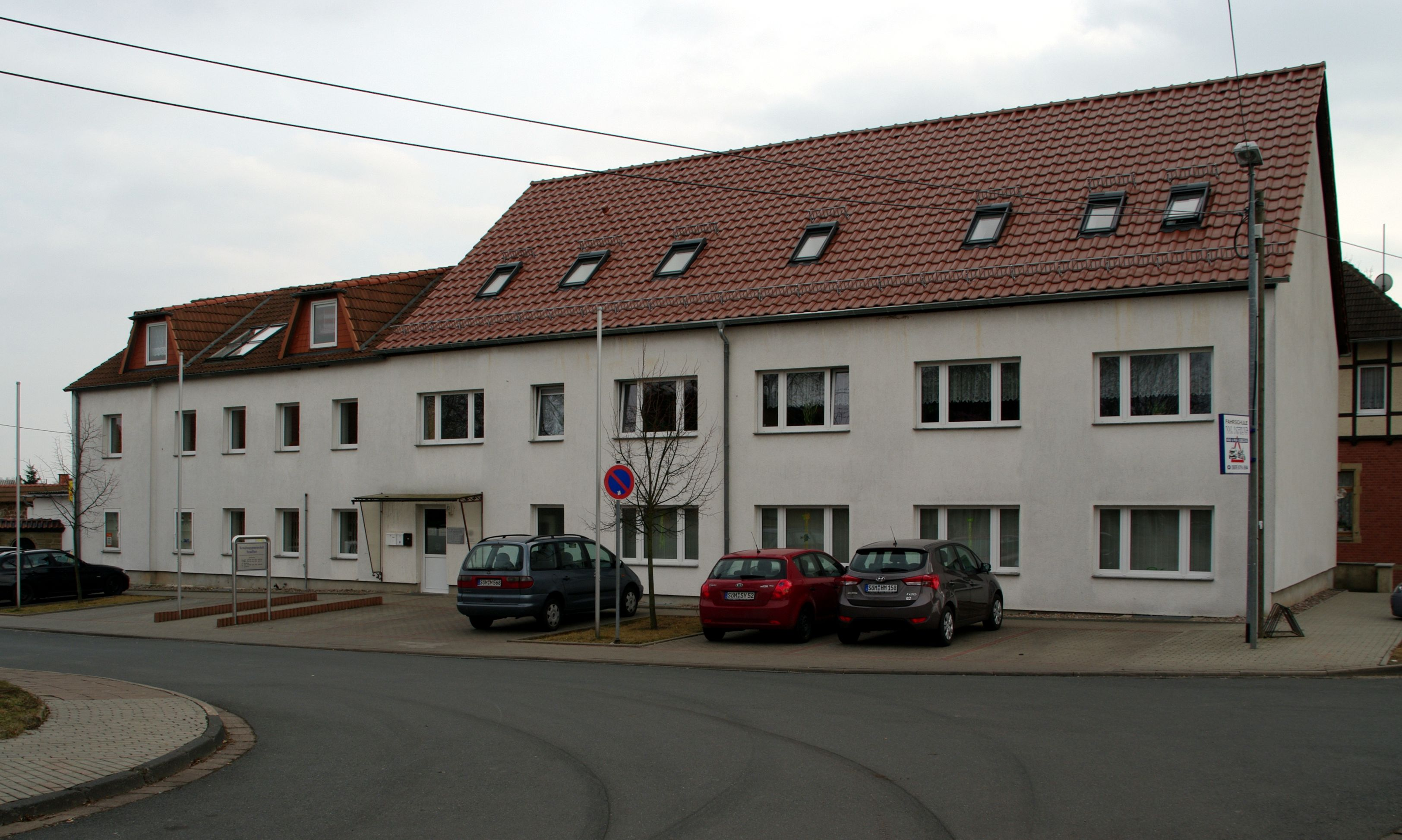 Der Sitz der Verwaltungsgemeinschaft Straußfurt in der Bahnhofstr. 13 in Straußfurt.